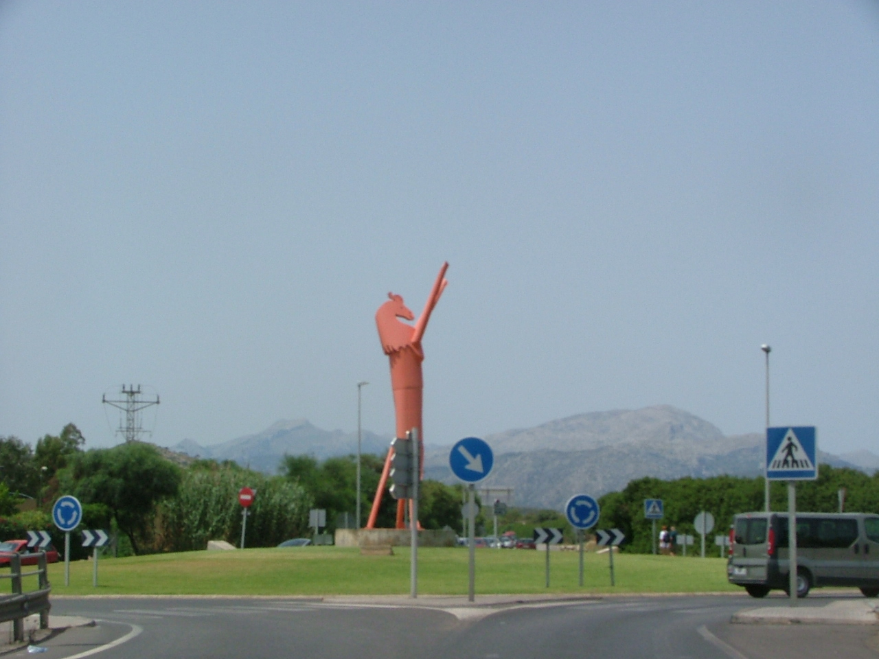 in Alcudia, Mallorca, Spain